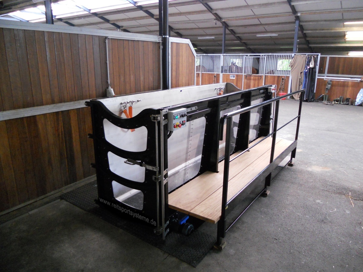 Aquatrainer, Wasserlaufband für Pferde